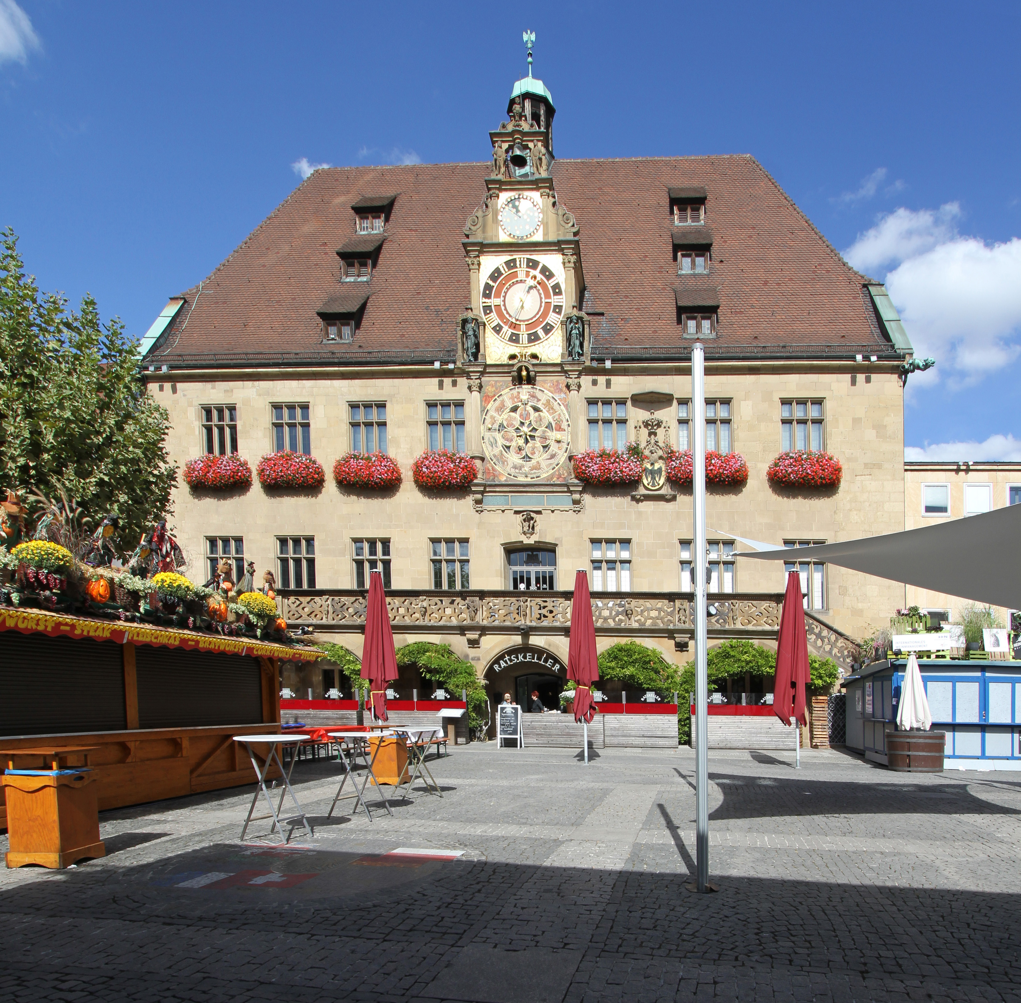 Heilbronn